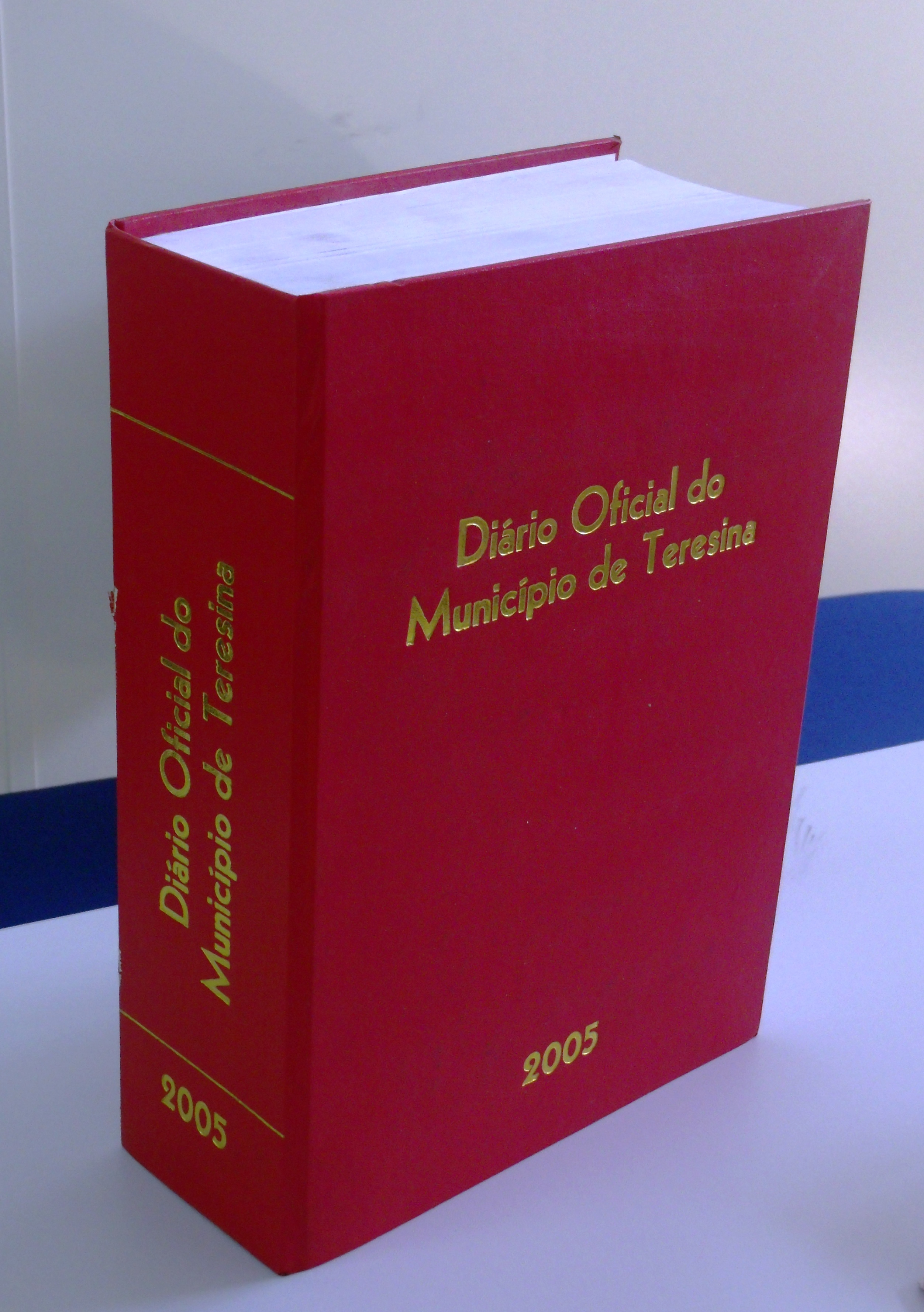 Encadernação com a coleção de 2005 de edições do Diário Oficial do Município de Teresina.